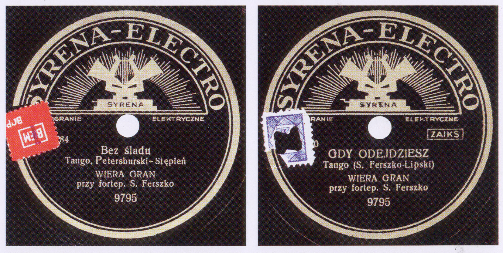 Opis plyty Wiery Gran 9795 z 1937 roku